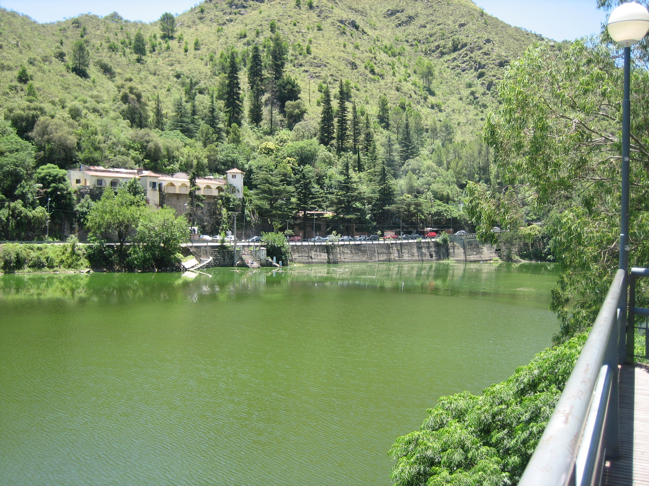 Lake San Roque, north of Villa Carlos Paz, Córdoba, Argentina.